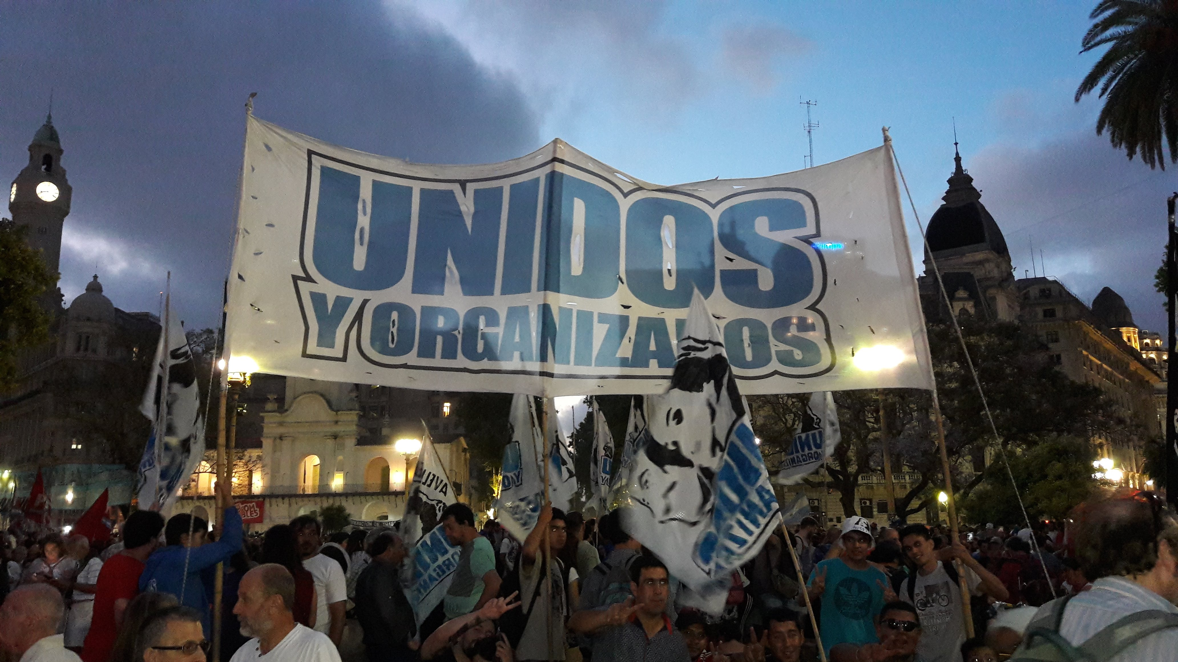 Marcha de la Resistencia, Plaza de Mayo, Buenos Aires, Argentina.